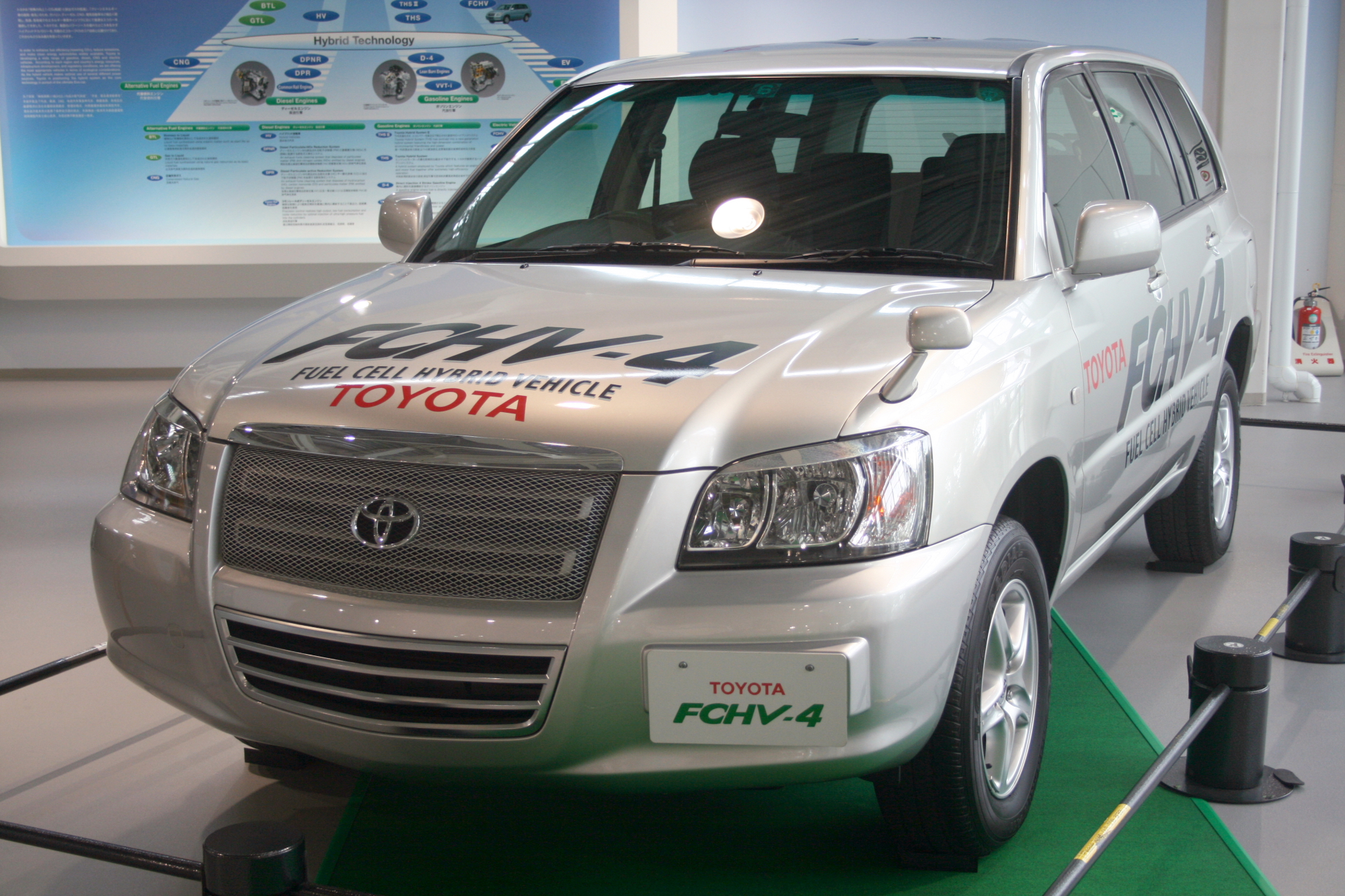 Toyota FCHV